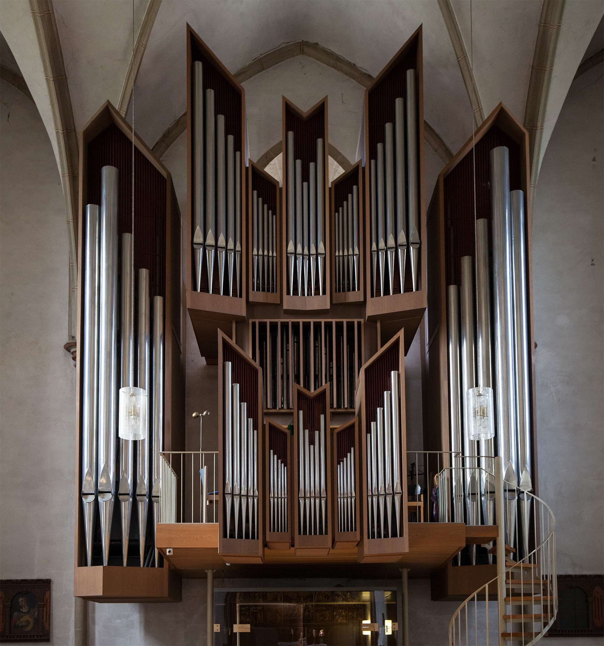 Orgel der Stiftskirche in Enger, Kreis Herford, Nordrhein-Westfalen (Orgelbauer: Gustav Steinmann).